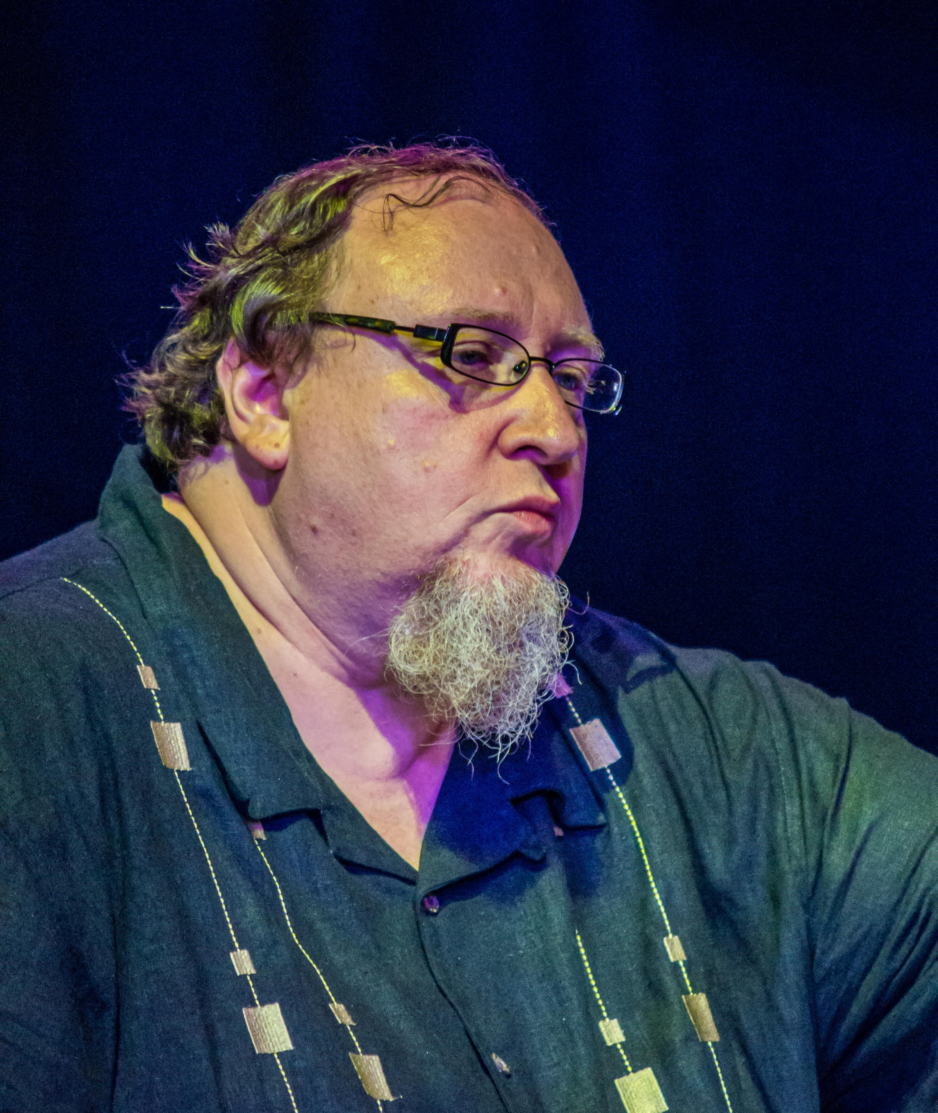 Das Zelt Musik Festival 2014 in Freiburg im Breisgau (16.07.2014 - 03. 08.2014) Das Jazz-Jubelee zum 75. geburtstag auf dem Zelt Musik festival Perry Robinson "75" Jazz-Jubelee Perry Robinson Sax'n Hop Magnetband Les Saxofous